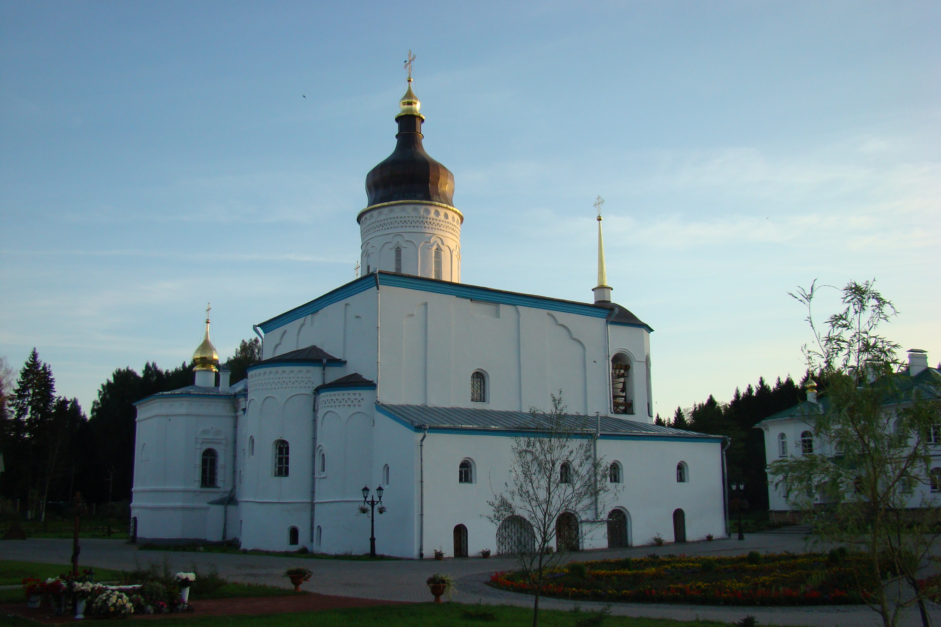 Елеазаров монастырь, Псковский район, Псковская область